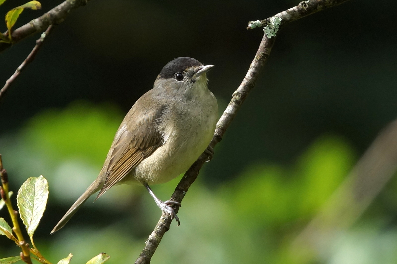 Mustapääkerttukoiras